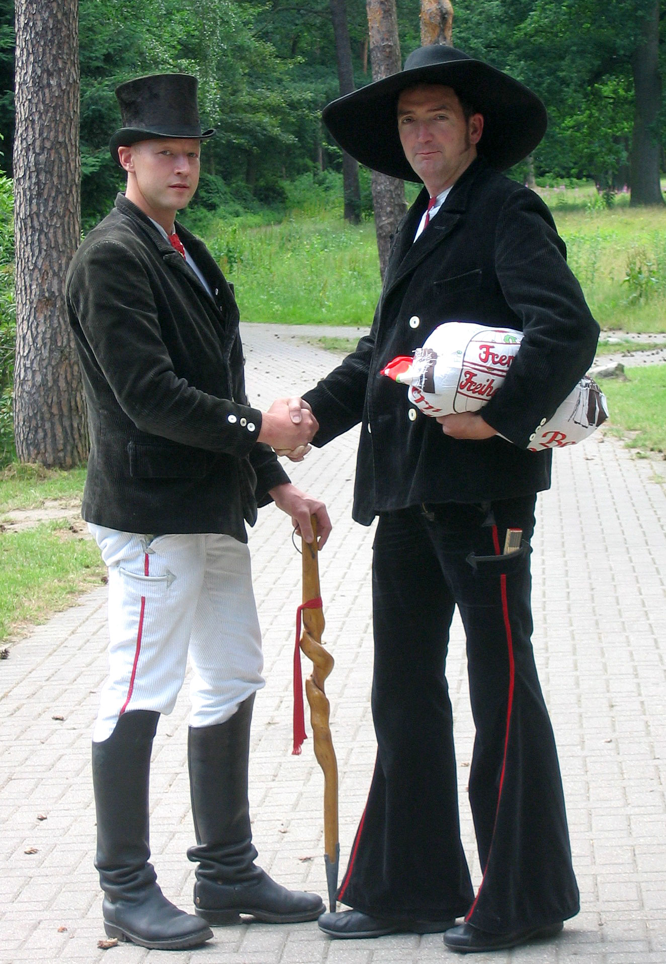 Freiheitsbrüder Ralf und Thomas, 2006